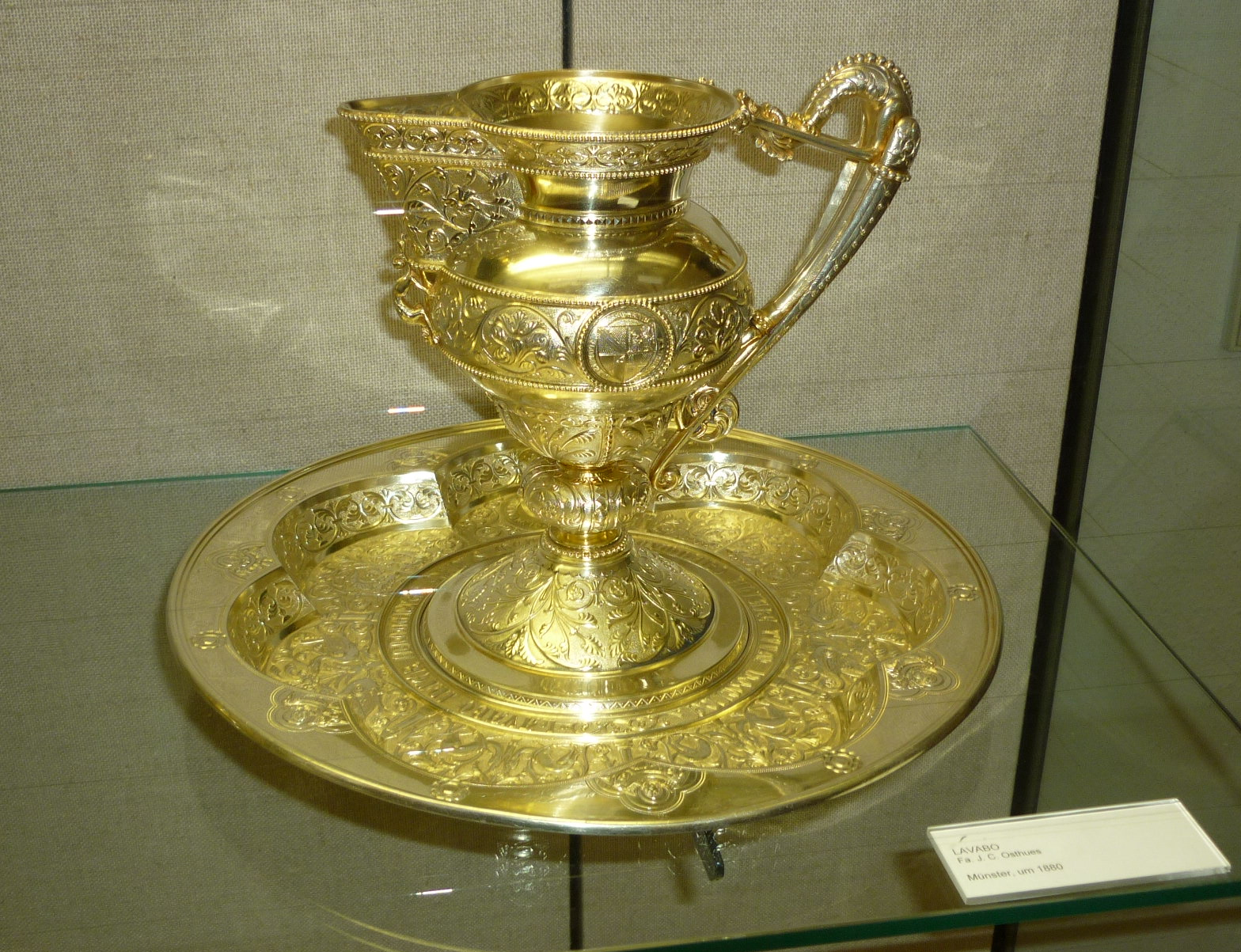 Lavabo